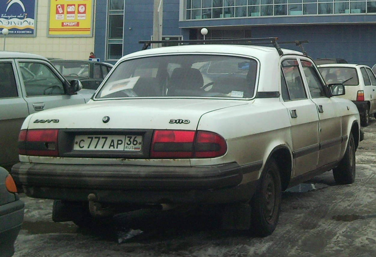 Sovetskiy rayon, Voronez, Voronezhskaya oblast', Russia